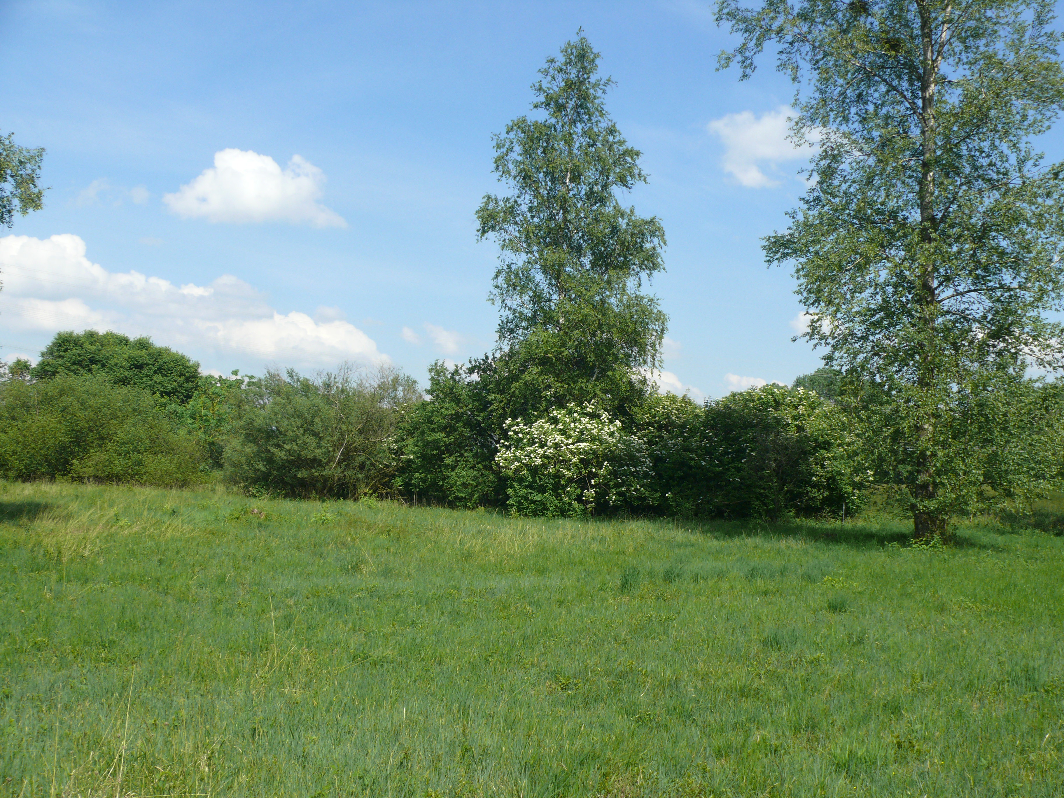 Naturschutzgebiet Gfällach, Landkreis Erding, Bayern